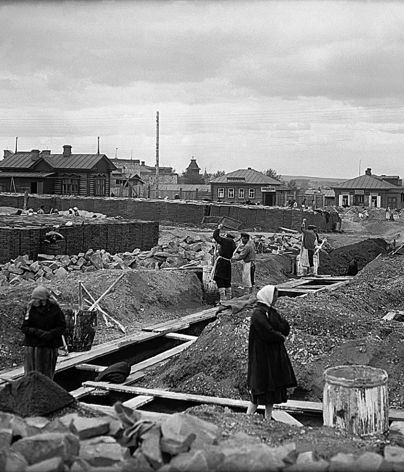 Постройка жилых домов на бывшем конном базаре близ костела. Рабочие за гашением извести в «творилах». Ныне – угол проспекта Ленина и улицы Свободы. В 1927 году на одного живущего в городе норма составляла 4,4 квадратных метра, половина жилплощади города – бараки и землянки. Государственный исторический музей Южного Урала